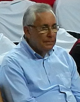 Aydın Örs 1 20170902